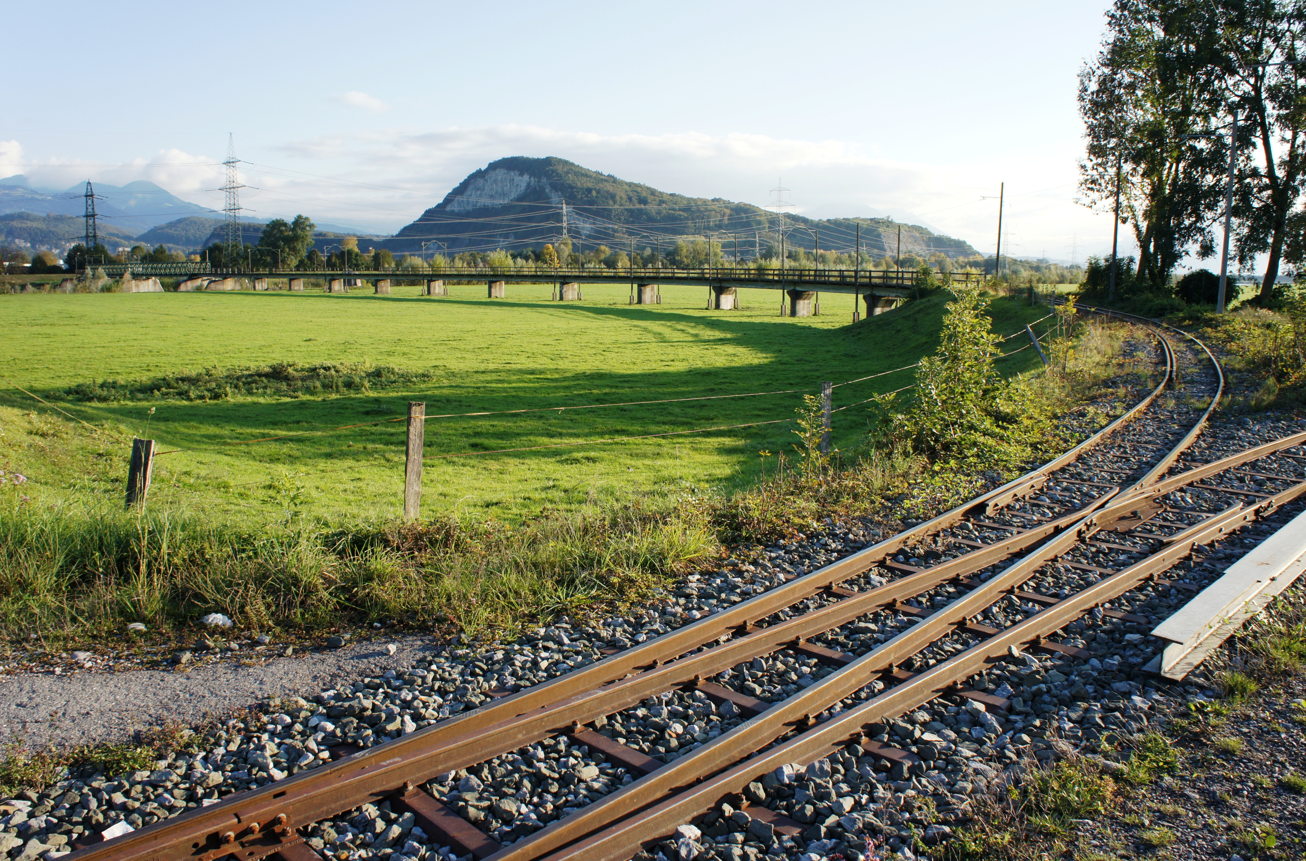 Blick aus Norden auf die Brücke der Dienstbahn der Internationalen Rheinregulierung bei Kriessern (CH). Rechts im Vordergrund die Abzweigung in Richtung Montlingen. Im Hintergrund der Kummenberg (A).